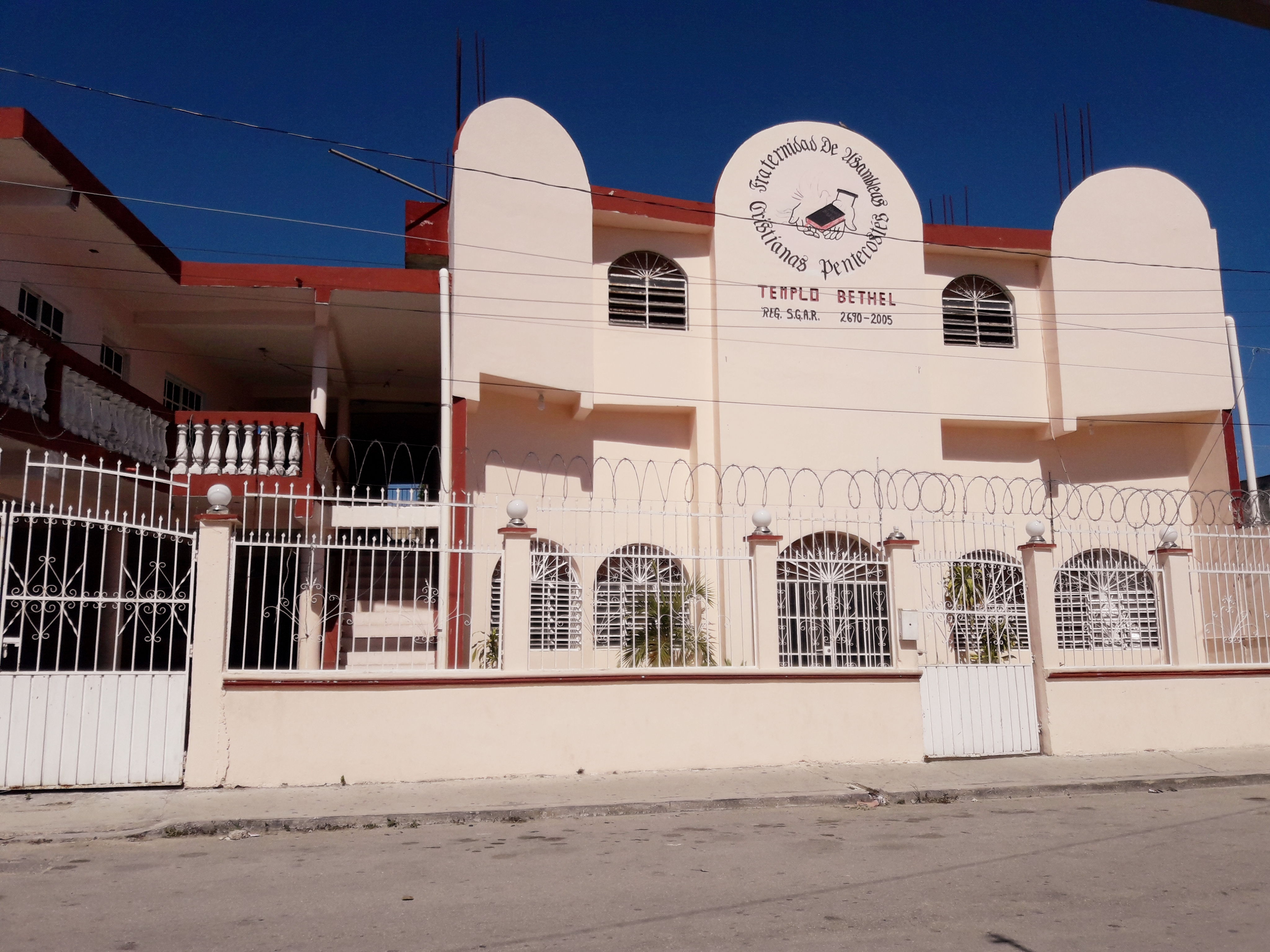 Pentecostal Church Cancun Mexico by Raymundo Tziu Cuxim